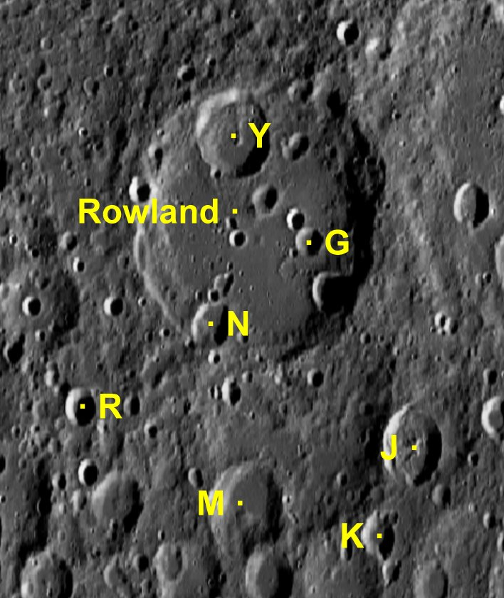 Cráter lunar Rowland. Cráteres satélite. (Imagen LRO)